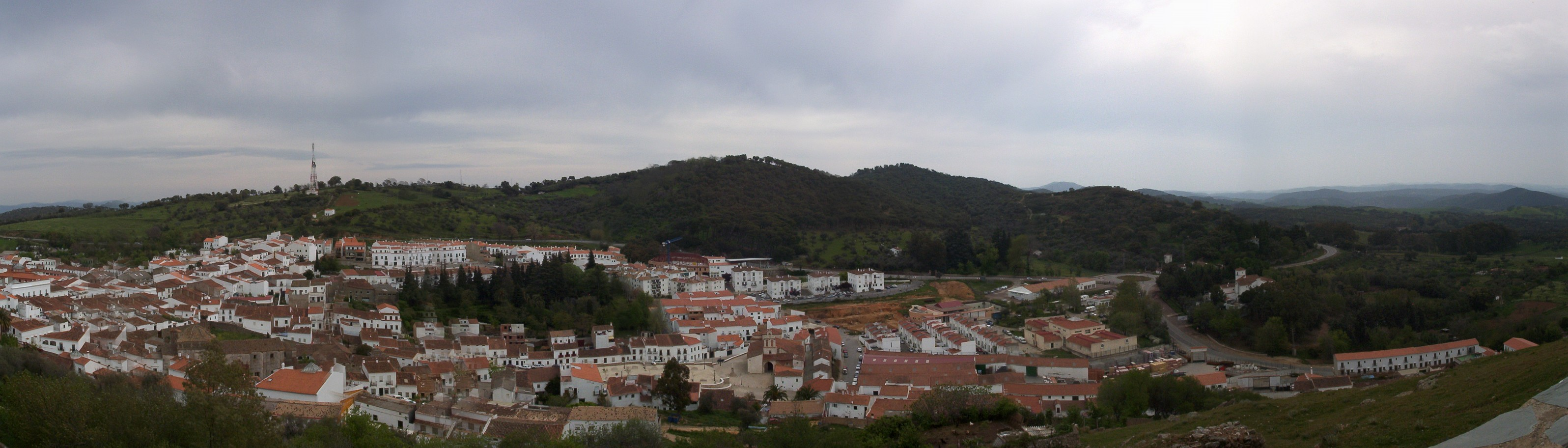 Panoramica desde el castillo de Aracena